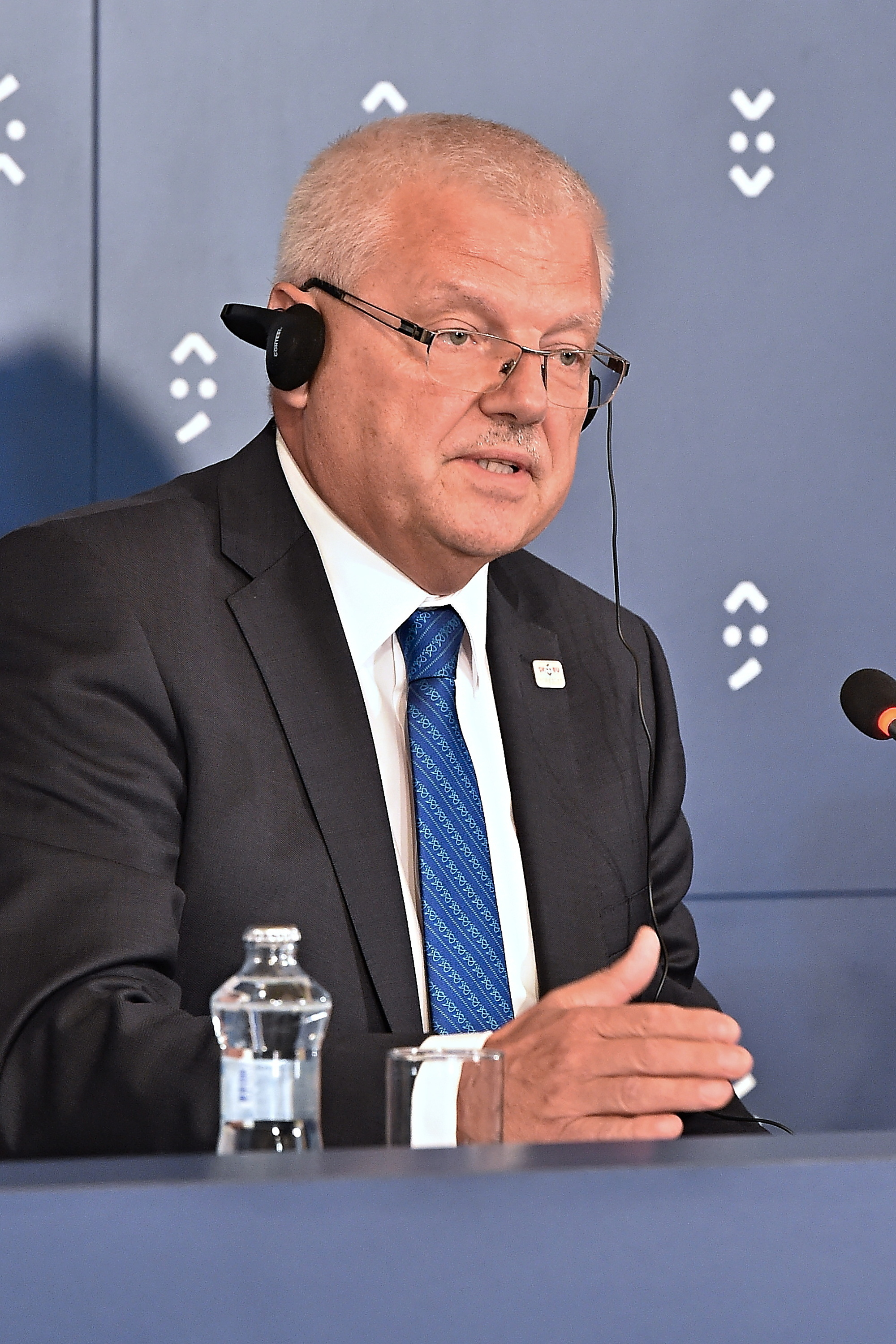 INFORMAL MEETING OF AGRICULTURE AND FISHERIES (Informal AGRIFISH) 2016-09-13 Slovakia-Mrs. Gabriela Matečná, Commission-Jerzy Plewa Photo Rastislav Polak